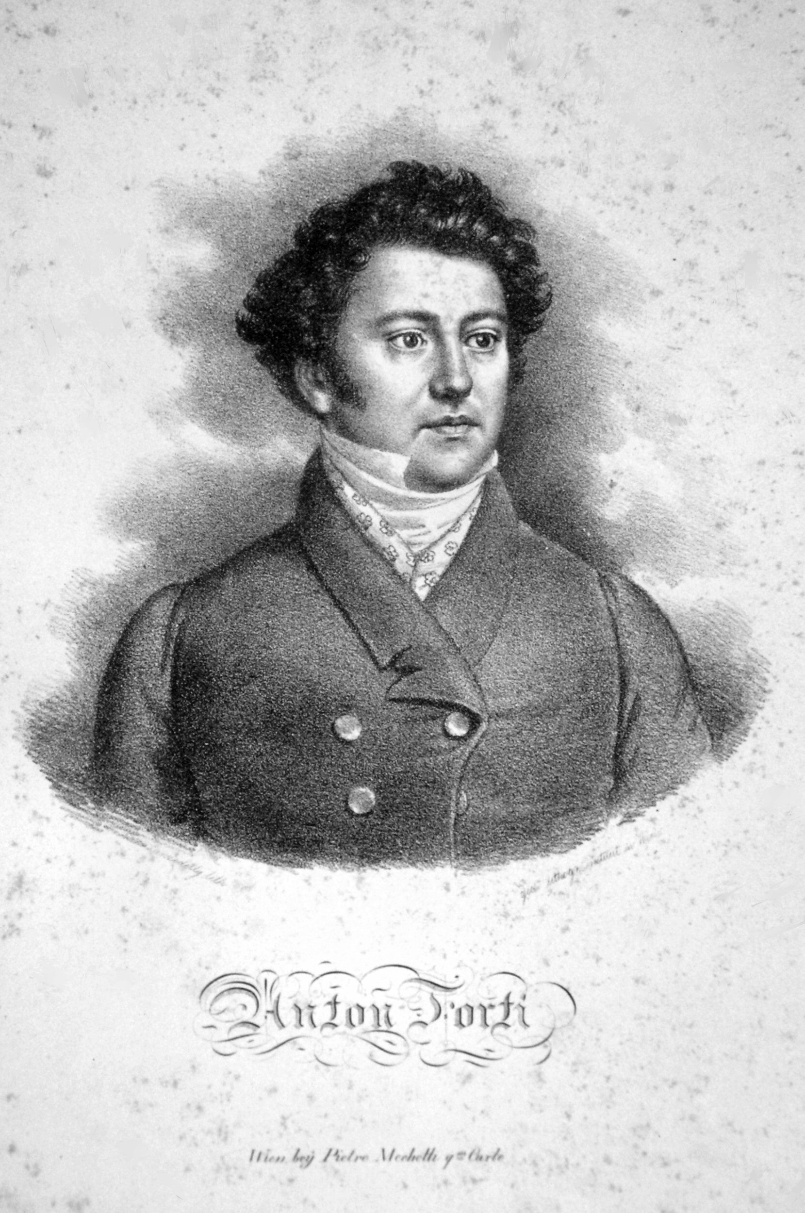 Anton Forti (1790-1859) österreichischer Musiker und erfolgreicher Sänger. Lithographie von Josef Lanzedelli d. Ä.